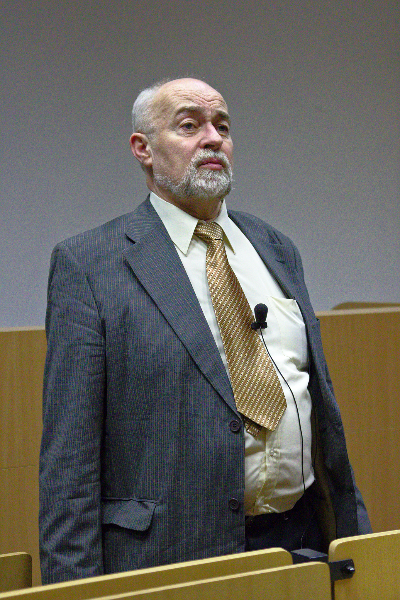 Prof. Rejnuš na přednášce Měnové války v rámci Klubu investorů Brno.